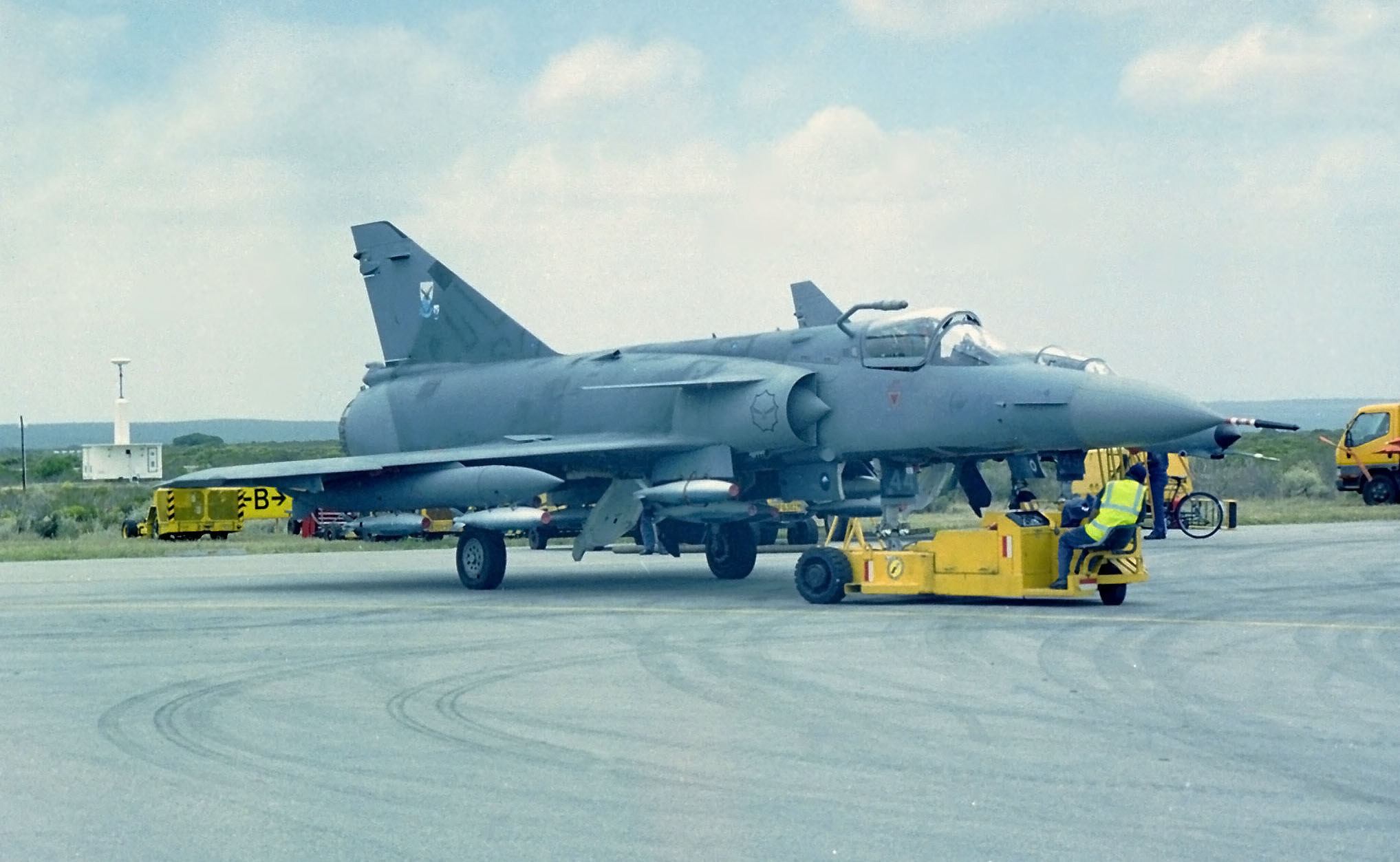 SAAF Cheetah-C 344